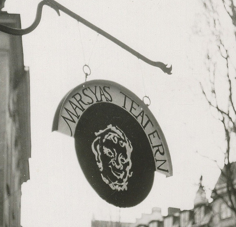 Marsyasteaterns skylt vid Österlånggatan 13